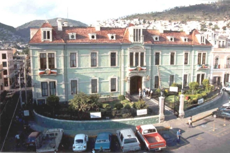 Imágen del edificio de la "Casa Rule", la Presidencia Municipal de la ciudad de Pachuca de Soto.